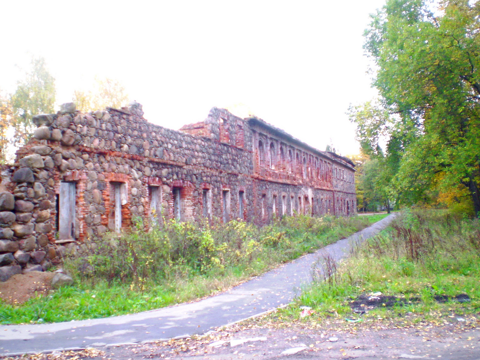 Бывшая мыза Рябово. Булыжная конюшня Всеволожских